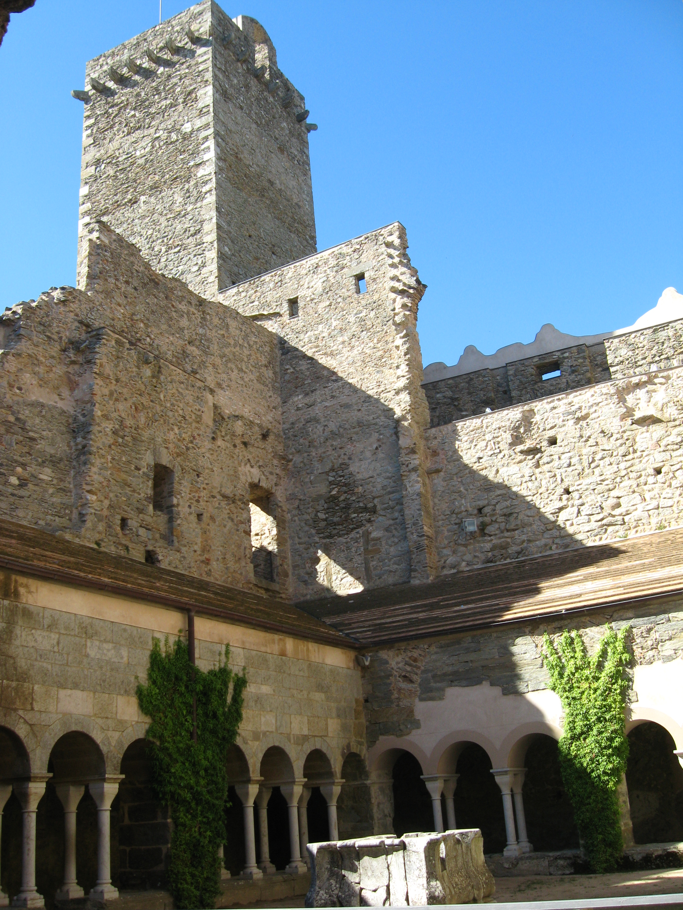 Kloster Sant Pere de Rodes Datum: 19.09.2010 Urheber: Michael Pfeiffer alias Benutzer:Gordito1869 Quelle: privates Fotoarchiv des Urhebers